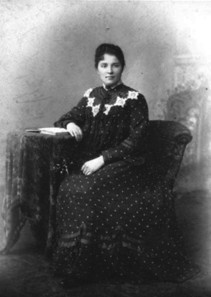 Alma Wartenberg (1871–1928), deutsche Sozialdemokratin und Frauenrechtlerin